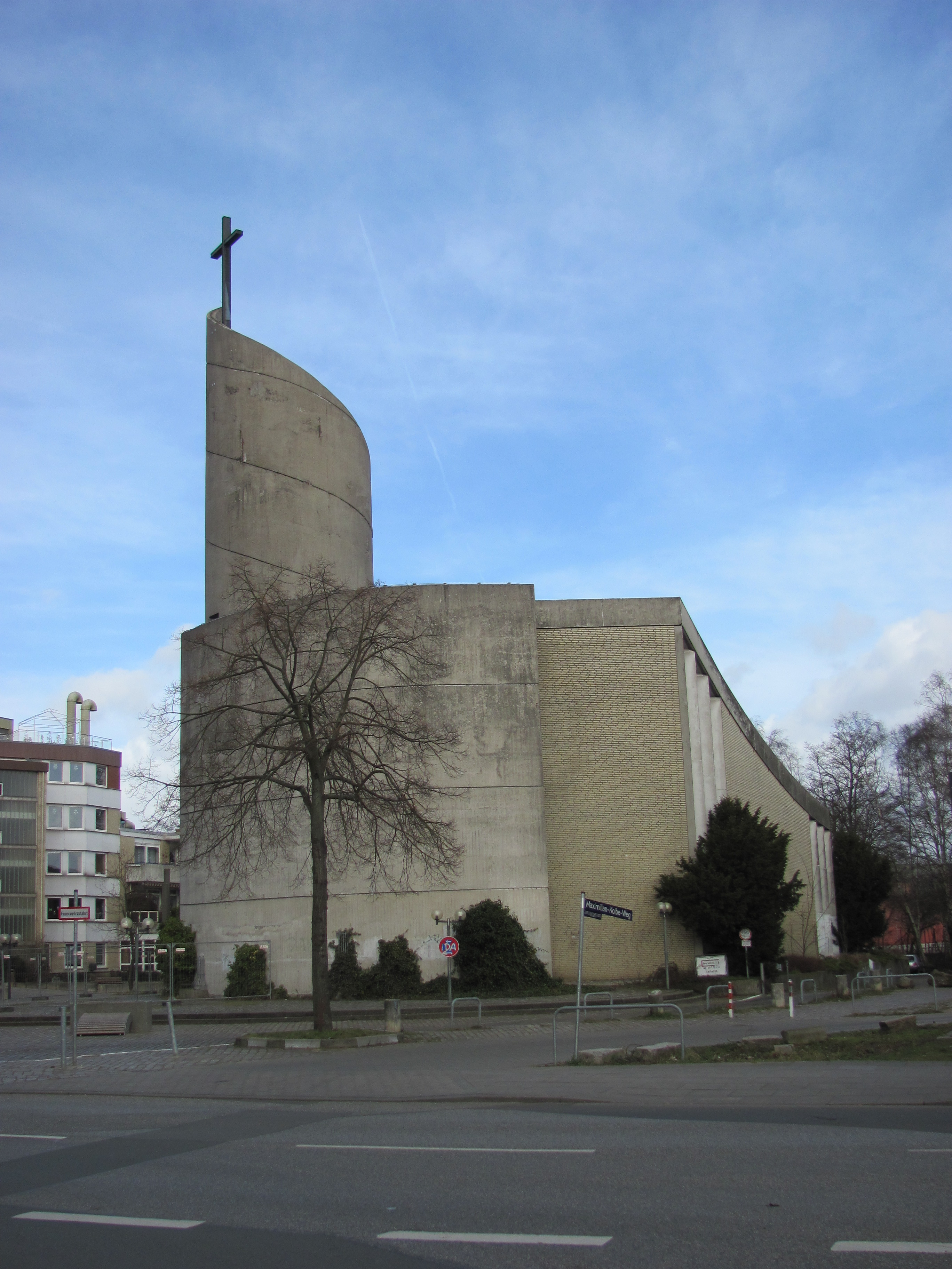 Straßenansicht von St. Maximilian Kolbe in Hamburg-Wilhelmsburg